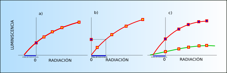 Gráficos representativos de tres formas de calcular la paleodosis en dataciones por termoluminiscencia: a) adición de dosis; se mide la termoluminiscencia natural de una fracción de la muestra a analizar (cuadrado azul) y a otras fracciones se las irradia con distintas dosis (cuadrados amarillos). La línea que une todos los puntos (línea roja) se alarga hasta el eje de abcisas, obteniendo la paleodosis. b) método regenerativo; se mide la termolumiscencia de distintas fracciones de muestra (cuadrado azul). Después se irradian las fracciones con distintas dosis (cuadrados amarillos) y se traza una curva (línea roja) que une los valores obtenidos. La paleodosis se obtiene al confrortar la termoluminiscencia natural con la curva obtenida. c) método del blanqueado parcial; se realiza el método de adicción de dosis (línea roja) y por otro lado se mide la termoluniscencia de fracciones de muestra que se han "blanqueado" parcialmente exponiéndolas a luz (línea verde). La intersección de las dos curvas definen la paleodosis.